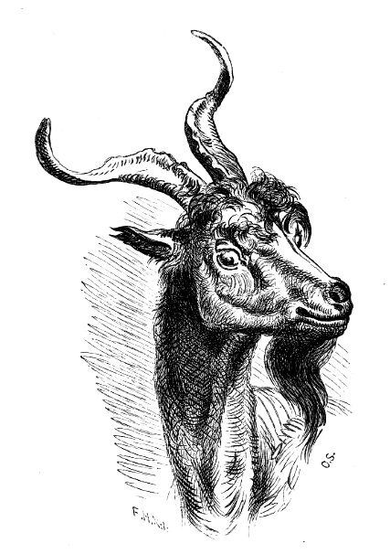 Illustration for the Norwegian fairy tale "De tre bukkerne Bruse" in Norske folke- og huldre-eventyr from 1879